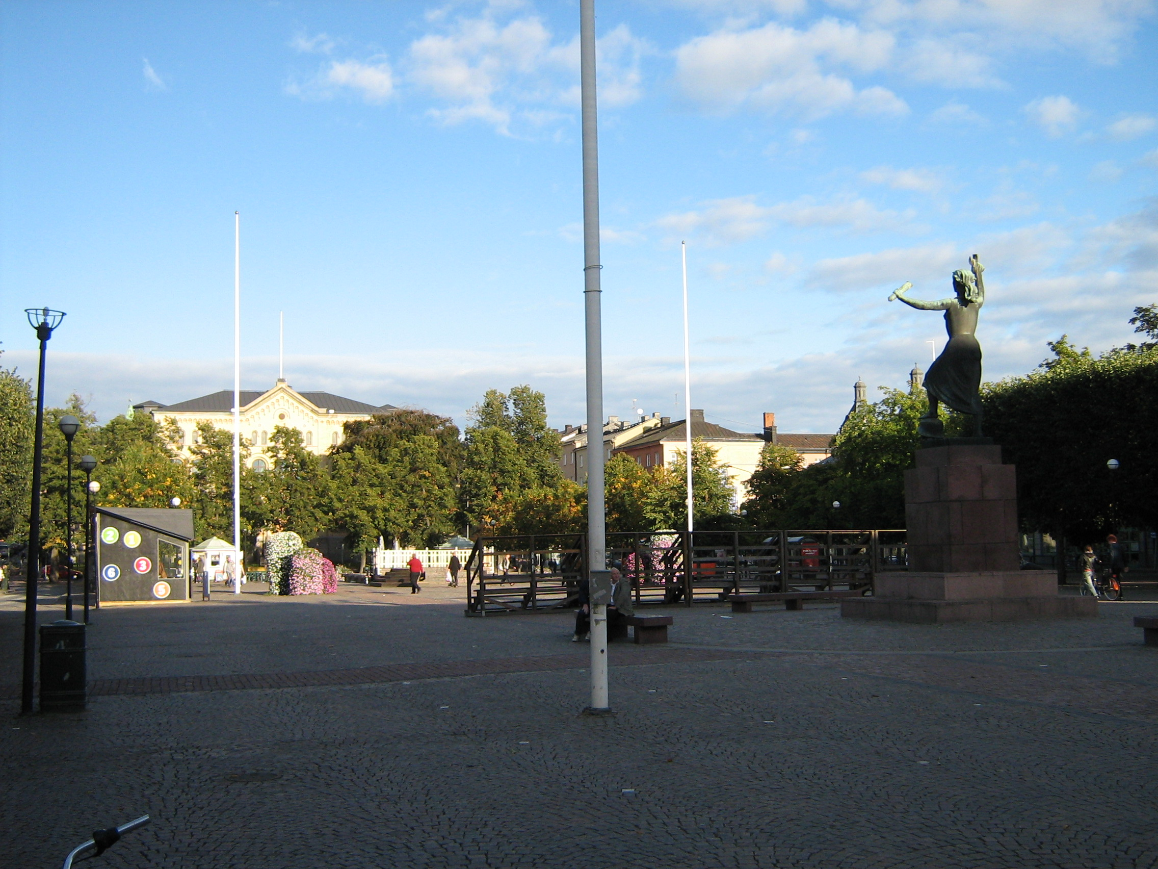 Stora torget i Karlstad med Tingvallagymnasiet i bakgrunden.